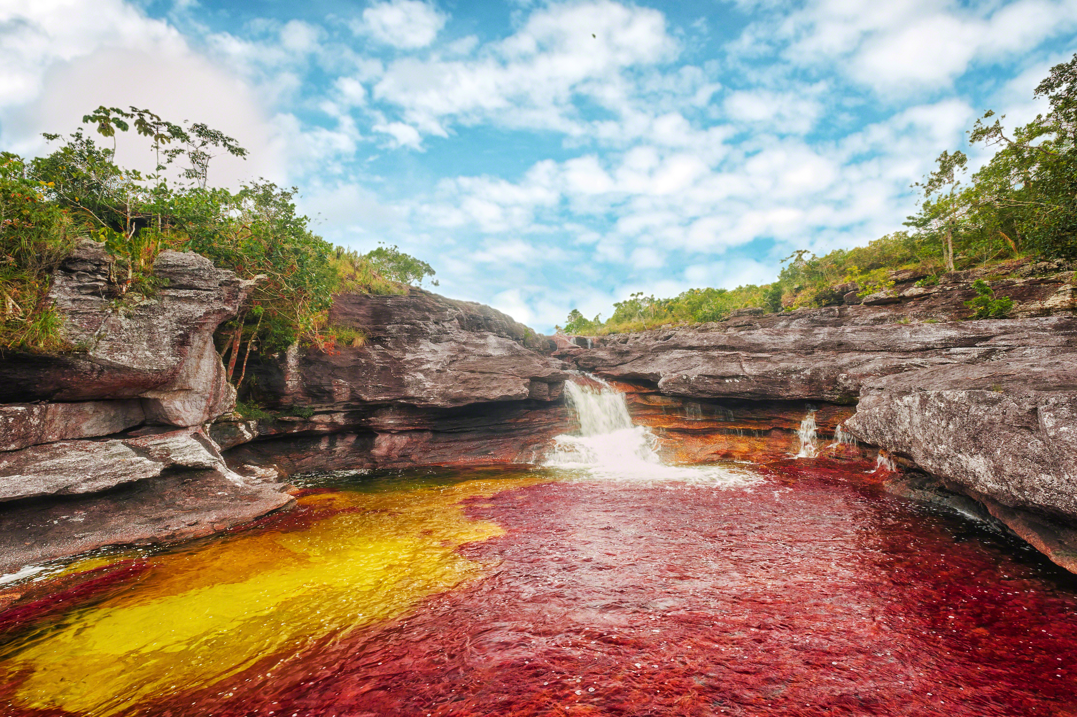 Agua que pareciera estar teñida de rojo, producto de la abundancia de la planta Macarenia Clavigera, en Caño Cristales, La Macarena, Meta. Fotografía por Mario Carvajal, Licenciada con Creative Commons Reconocimiento 3.0 Unported. Usted puede usar esta imagen en cualquier proyecto, inclusive con fines comerciales, siempre y cuando otorgue el crédito de autoría y el vínculo hacia el proyecto de Caño Cristales, correctamente. (